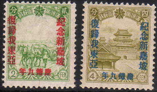 満州国が日本軍によるシンガポール攻略を記念して発行した切手。普通切手に中国語と満州国年号を加刷して発行したものである